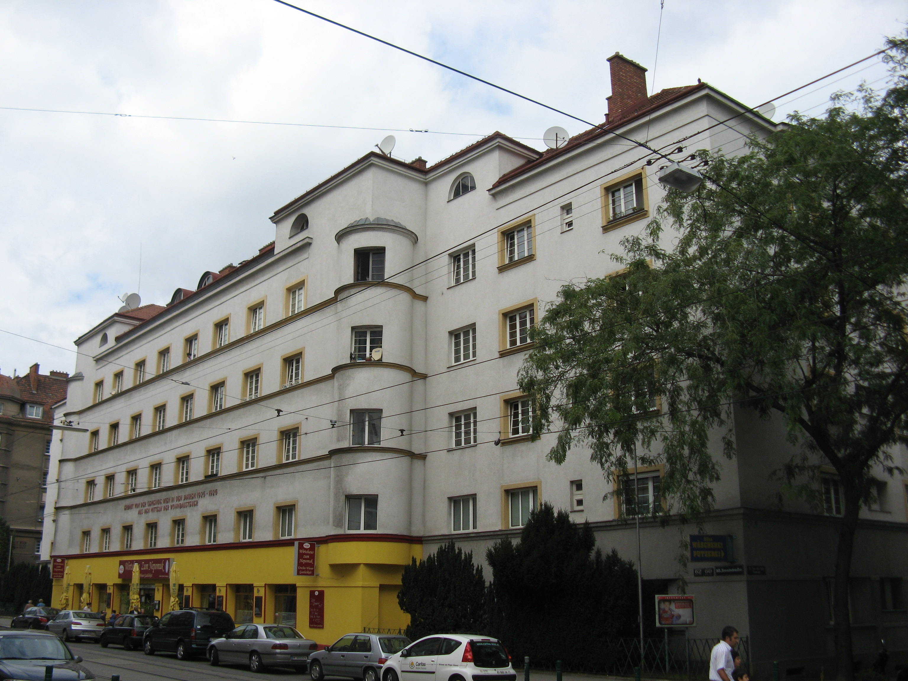 Wohnhausanlage (1924-25) von Ernst Egli, Troststraße 60-62, Wien-Favoriten